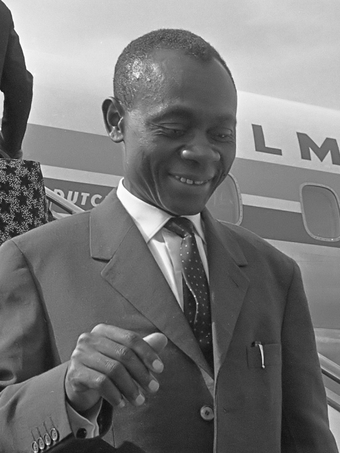 Aankomst van vice president van Kameroen J. Foncha op Schiphol 19 mei 1964